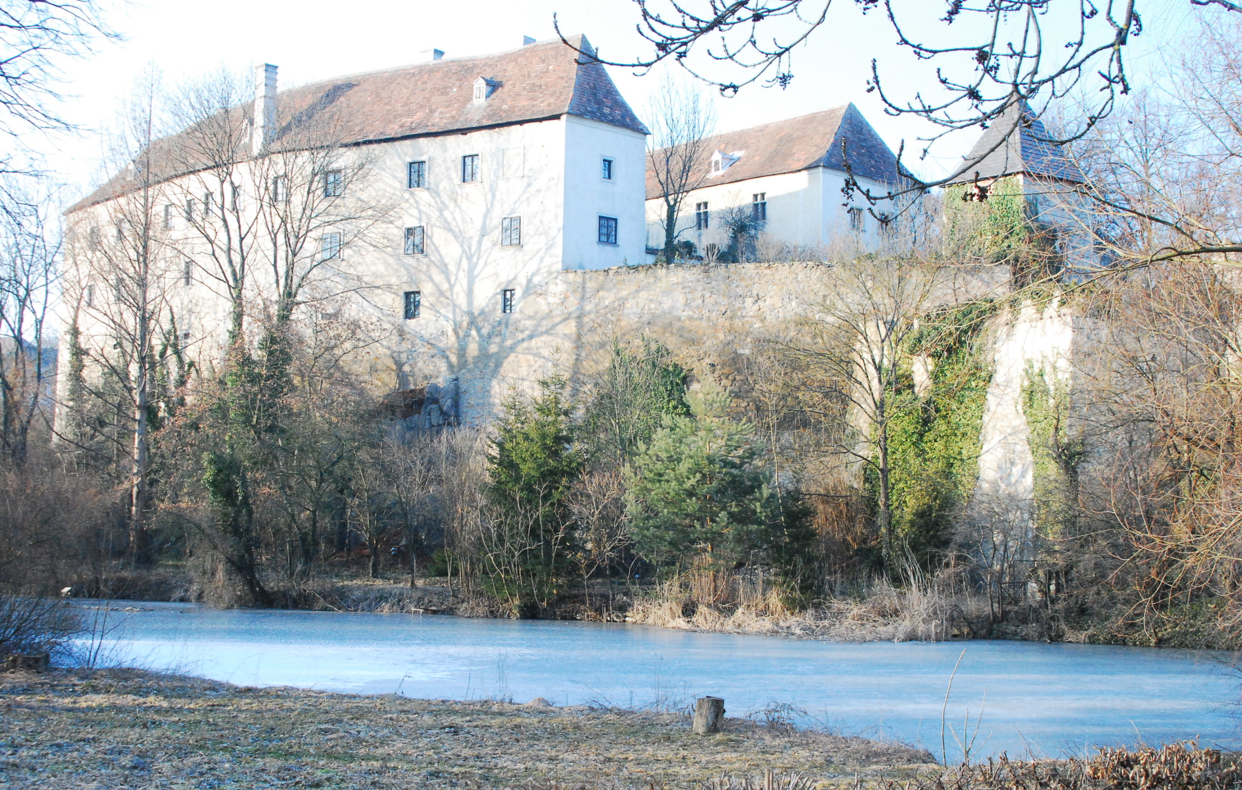 Burg Schleinitz in Burgschleinitz in Niederösterreich.